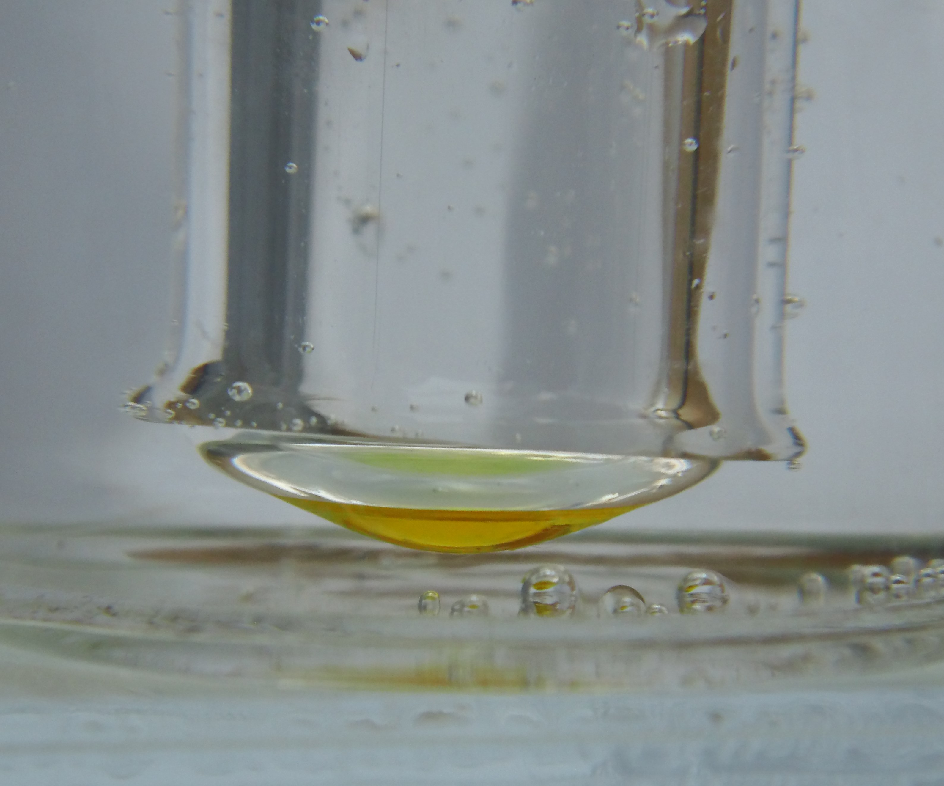 Nitrogen trichloride